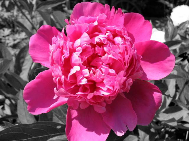 Blume Colorkey